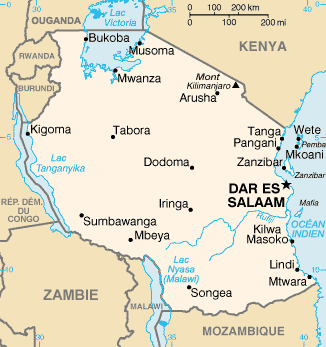 carte de la Tanzanie